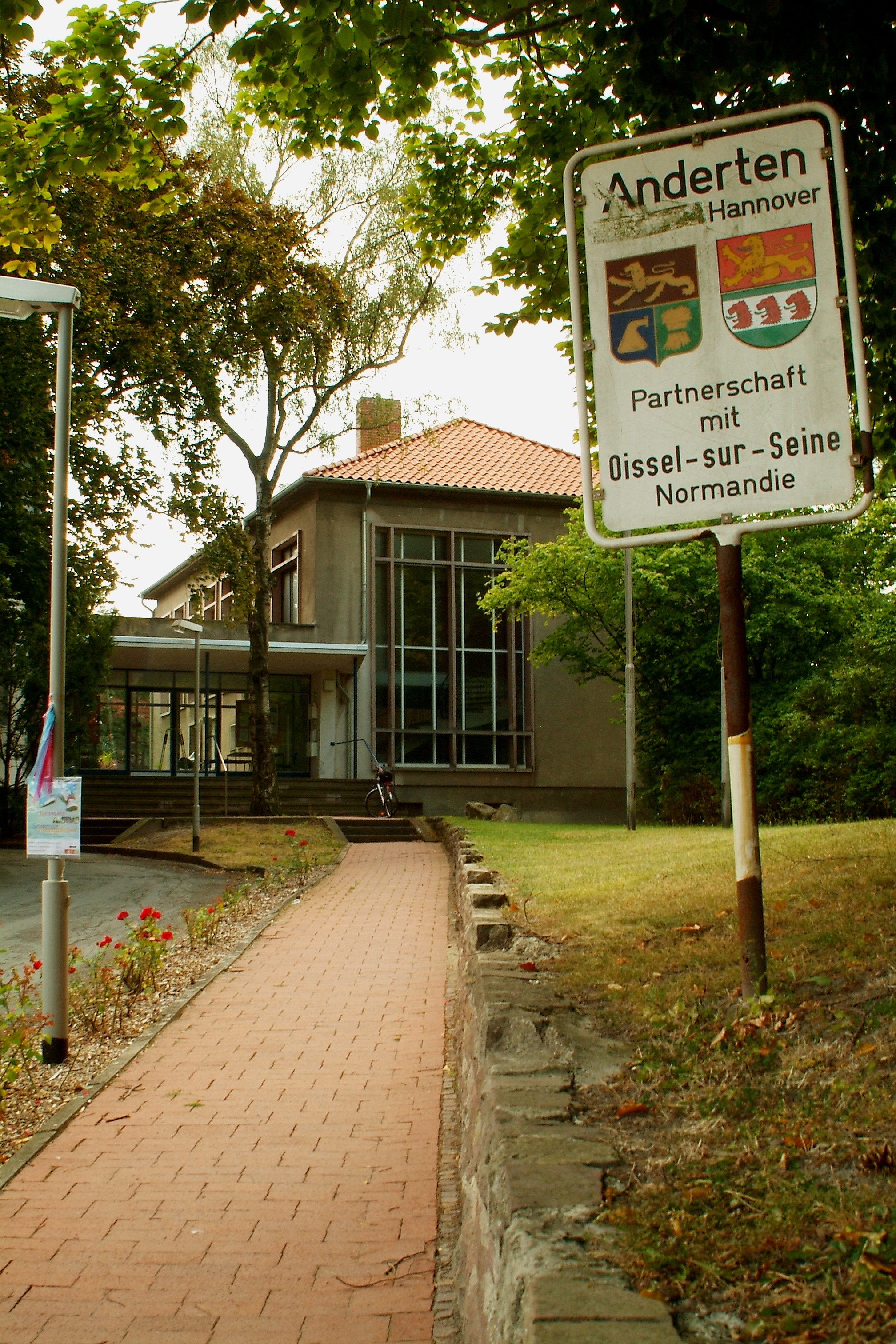 Eindrücke vom Doppel-Gebäude Torgarten 2, mit Altbau und Anbau in Anderten, Hannover ...